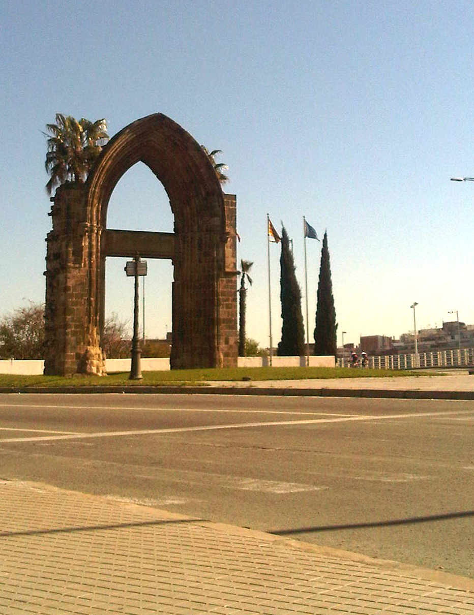 Pòrtic gòtic del Convent del Carme de Barcelona, traslladat a Sant Adrià de Besòs.